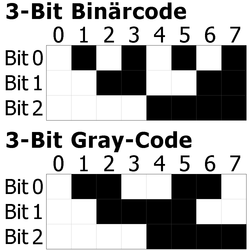 Vergleich eines 3-Bit Binärcodes mit dem entsprechenden Gray-Code, bei dem sich jeweils nur 1 Bit ändert.